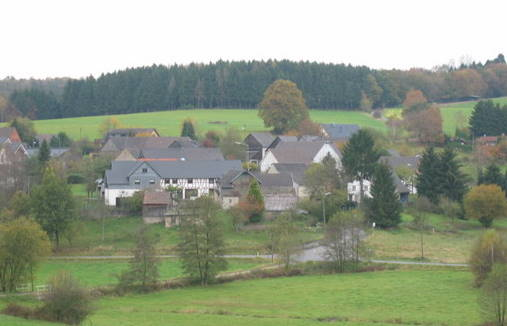 Blick auf Birkenbach - Gemeinde Nümbrecht